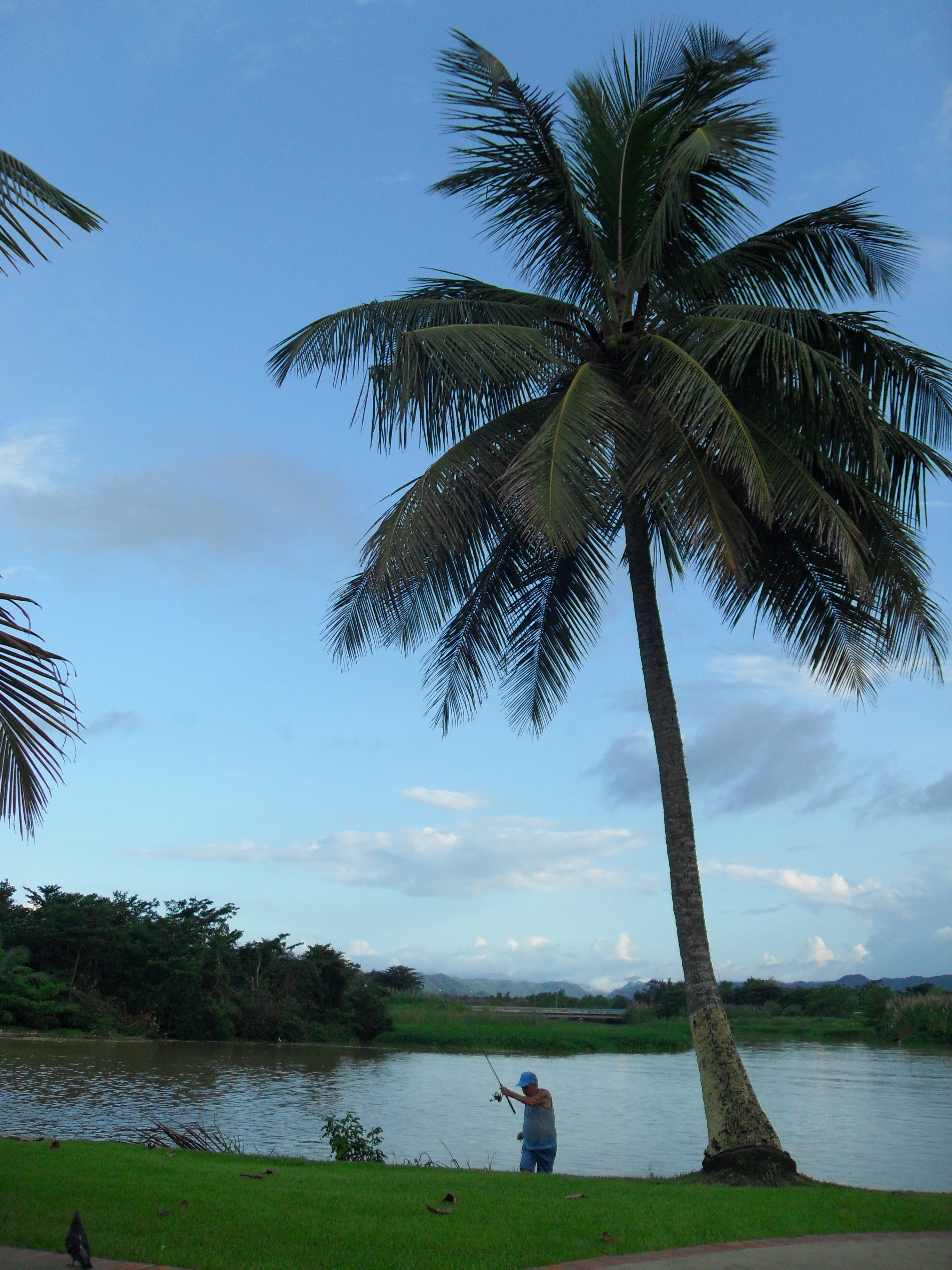 Rio Abacoa, Arecibo, Puerto Rico